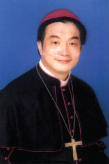 中文（台灣）: 天主教新竹教區劉丹桂主教